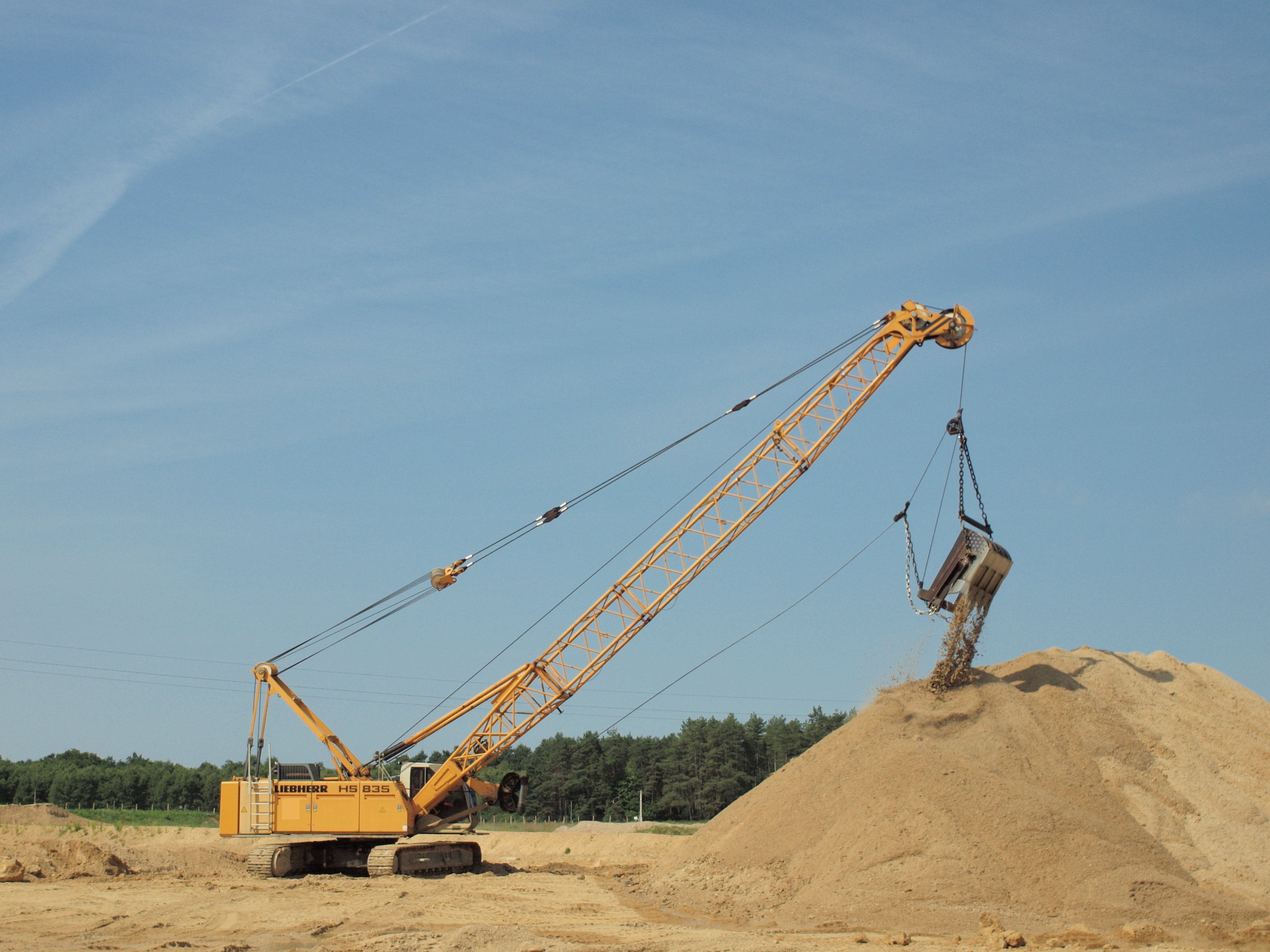 Dragline Liebherr HS 835 en action